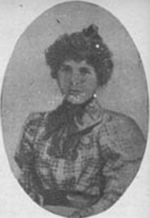 Griselda Hinojosa, primera química-farmacéutica de Chile, 1899.